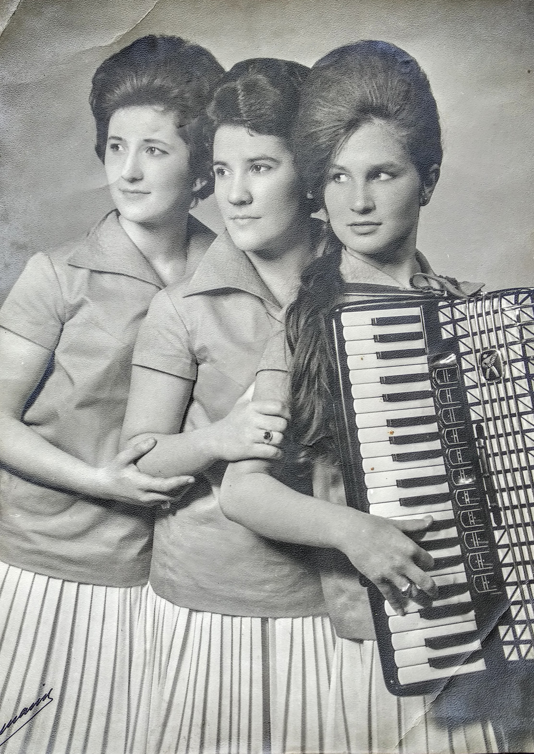 Marian Arregi Trio Kemen taldean aritu zen 1960ko hamarkadaren hasieran